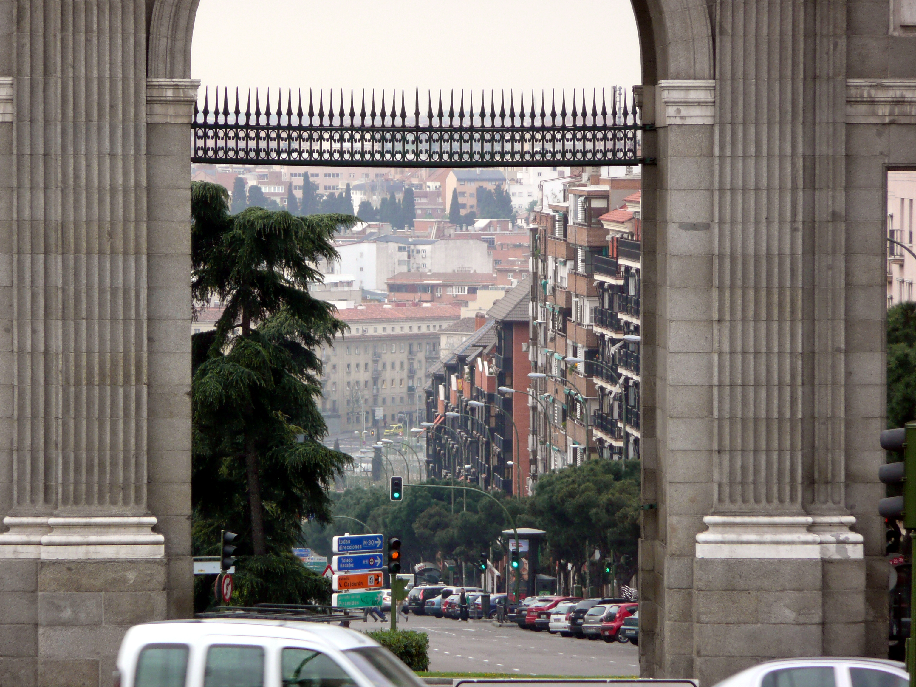 Madrid